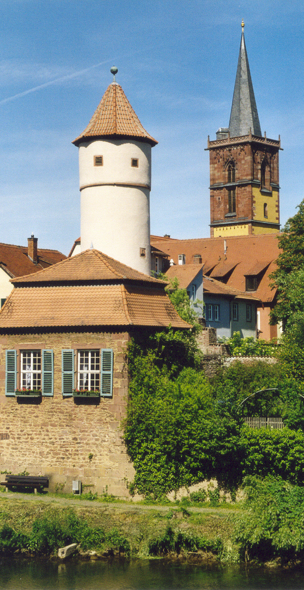 Wertheim : Stadtansicht. Blick über die Tauber zur Stiftskirche